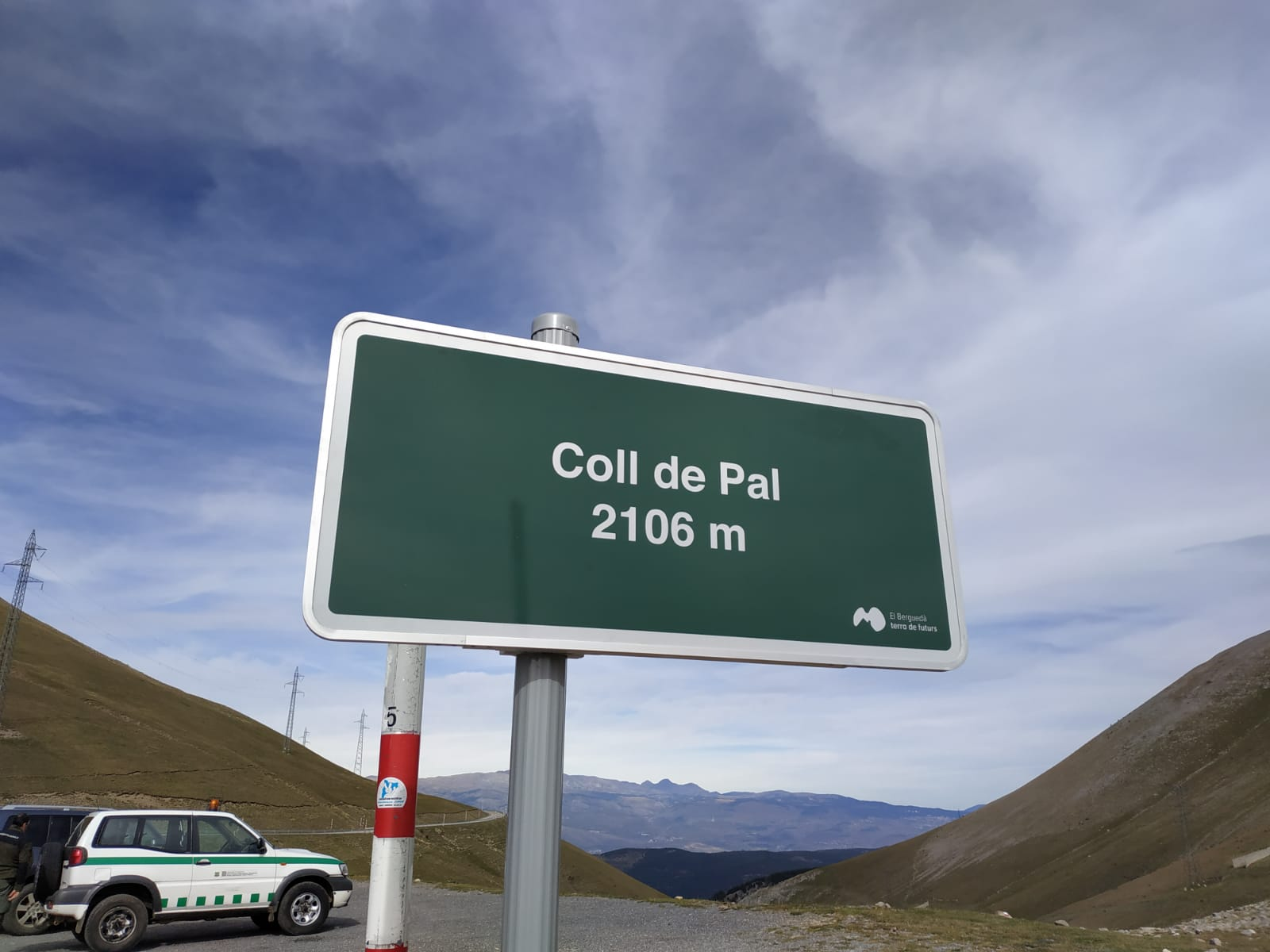 Rètol del Consell Comarcal al Coll de Pal amb l'alçada correcte, 2016 msnm